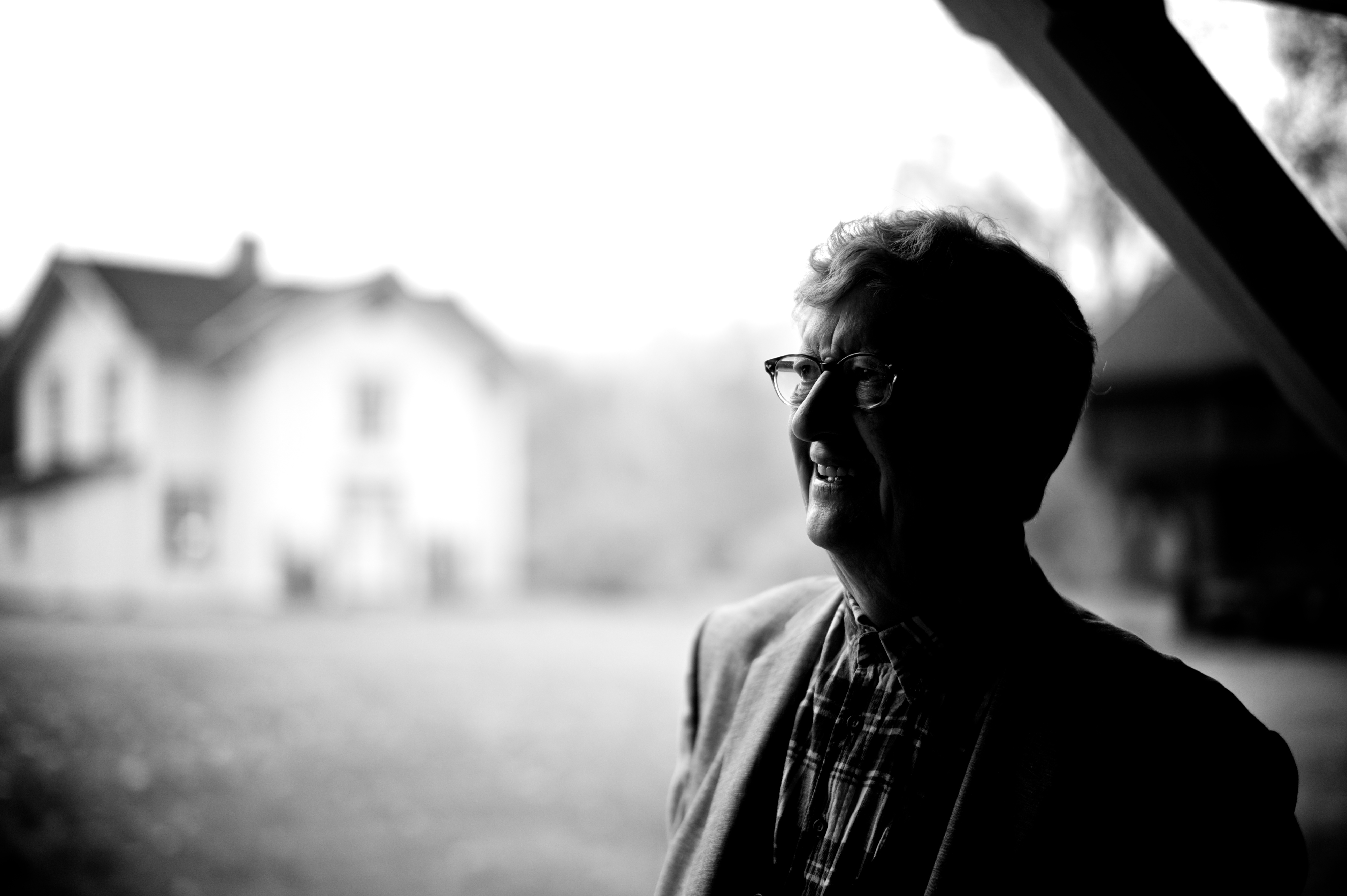 Forfatteren Hans Herbjørnsrud Fotograf Magnus Stivi